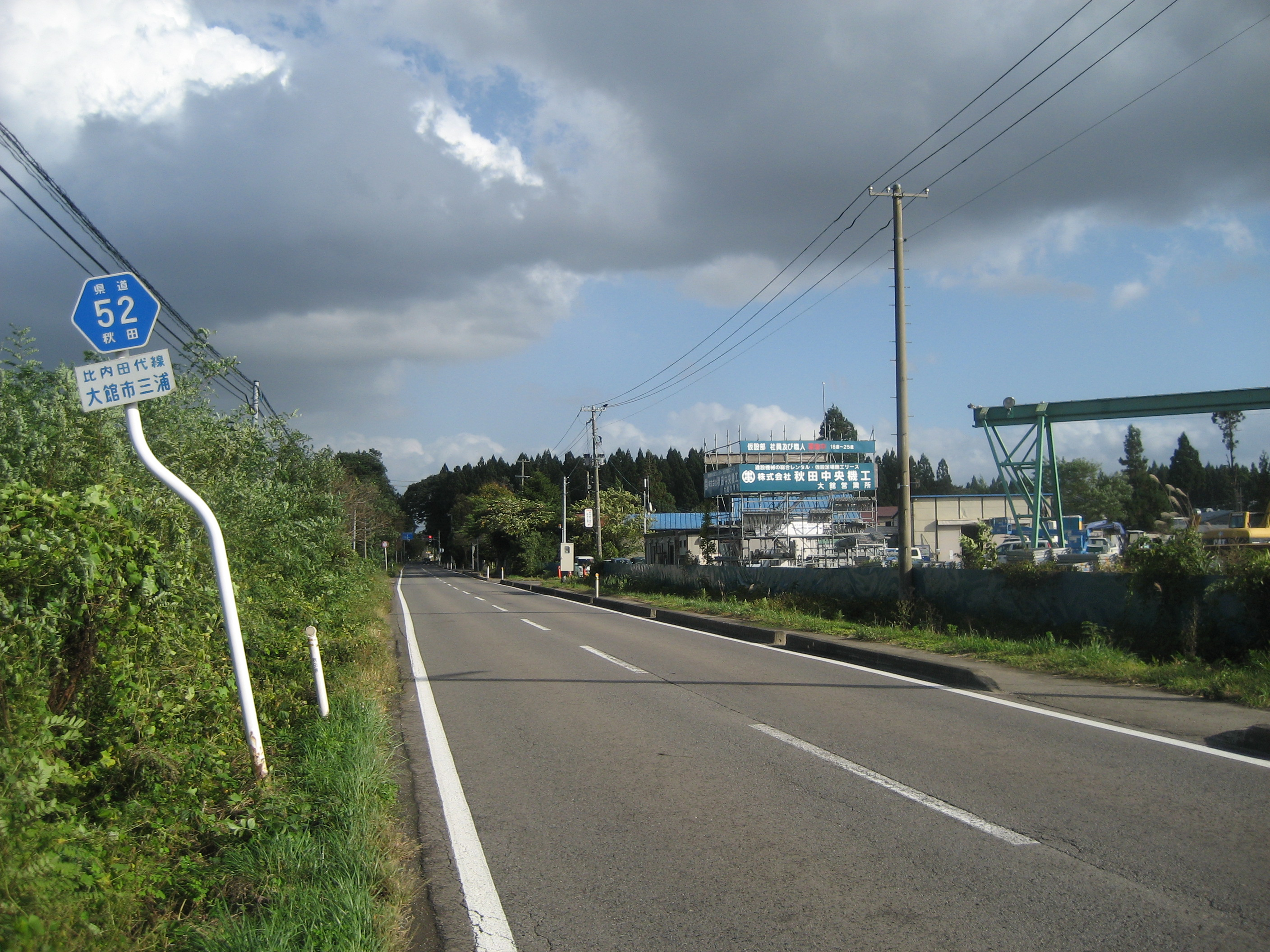 秋田県道52号線大館市三浦付近